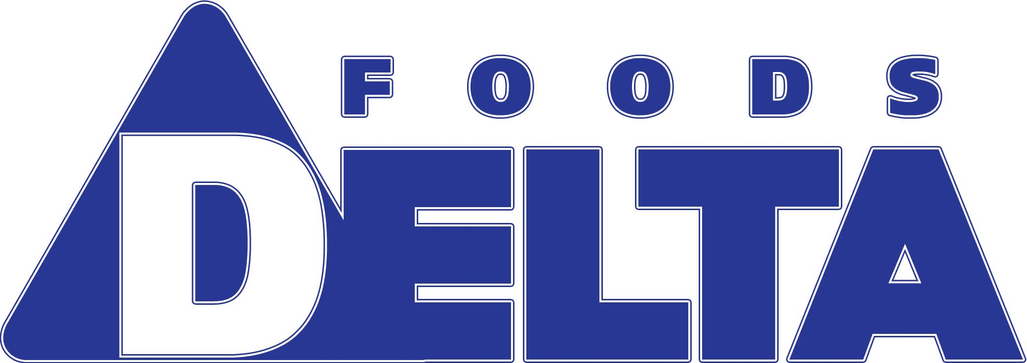 Монгол: лого